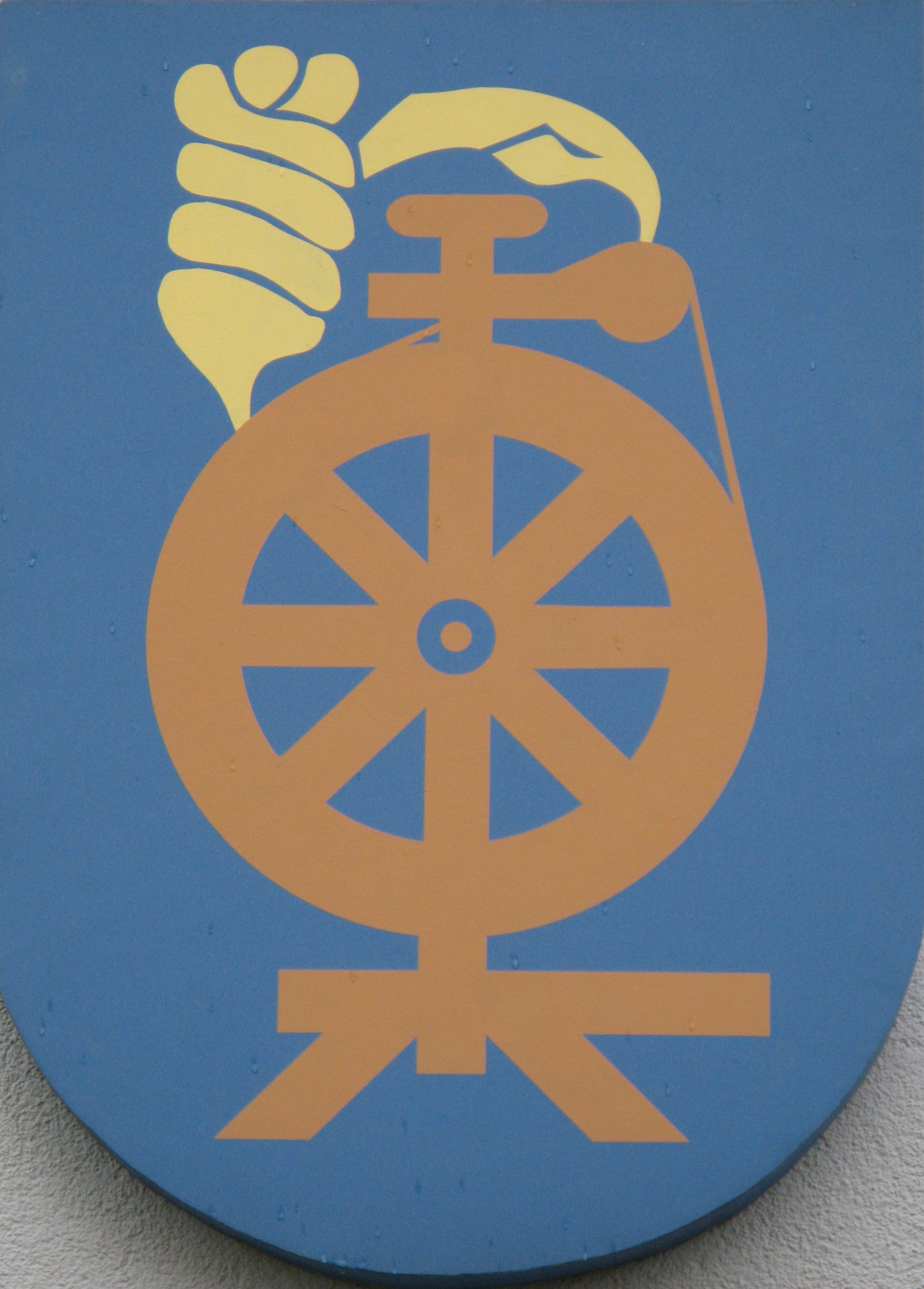 Wappen von Nottleben